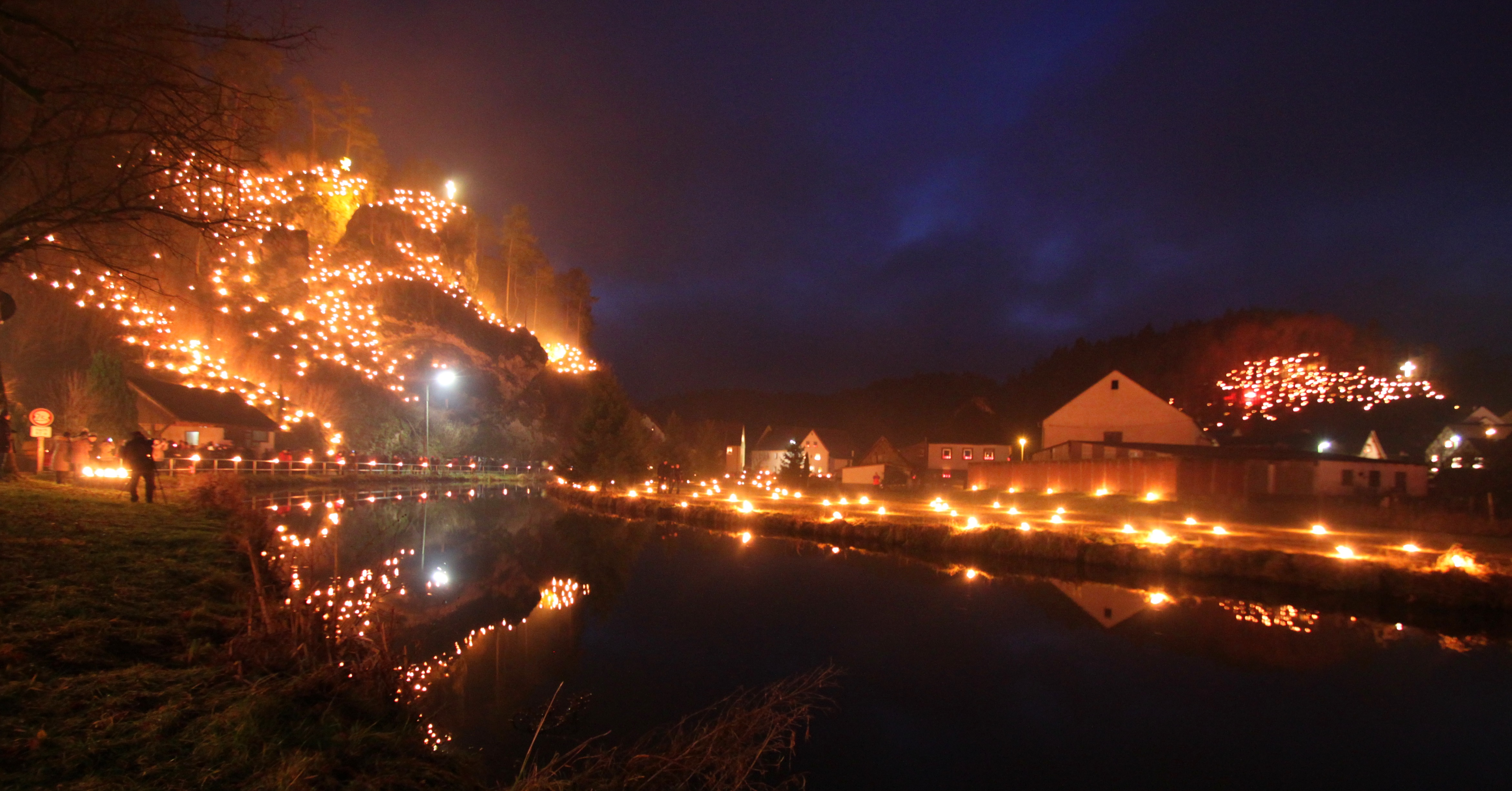 Lichterfest in Nankendorf, einem Ortsteil von Waischenfelt an Silvester. Tag der ewigen Anbetung, Prozession durch den Ort mit festlicher Illumination der umliegenden Hänge.